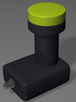 Konwerter pełno zakresowy Full Band Potocznie nazywany pojedynczym. Najbardziej rozpowszechniony konwerter. Pracuje w 2 polaryzacjach i 2 zakresach , wybór następuje poprzez wysterowanie przez odbiornik sat sygnałem(częstotliwości 22kHz i amplitudzie 0,6V) lub jego brakiem. Polaryzacja Pionowa zakres 10,7- 11,7GHz 14V Polaryzacja Pionowa zakres 11,7- 12,75GHz 14V Polaryzacja Pozioma zakres 10,7- 11,7GHz 18V Polaryzacja Pozioma zakres 11,7- 12,75GHz 18V Z tego względu konwerter ten potrafi obsłużyć tylko jeden odbiornik SAT który będzie sterował jego pracą. Podłączenie drugiego odbiornika jest możliwe poprzez przelotkę konwerterową w pierwszym odbiorniku (gniazdo oznaczone LOOP) lub specjalny rozdzielacz . Rozdzielacz musi posiadać zabezpieczenie przed podaniem sterowania przez drugi odbiornik. W takim układzie drugi odbiornik odbiera tylko programy z zakresu i polaryzacji wysterowanych przez pierwszy. W przypadku wyłączenia pierwszego odbiornika lub jego przejścia w tryb standby drugi odbiornik uzyskuje pełny dostęp do konwertera. Nie działa to w wszystkich przypadkach , przelotka LOOP może nie być aktywna(zależy to od producenta sprzętu i oprogramowania).